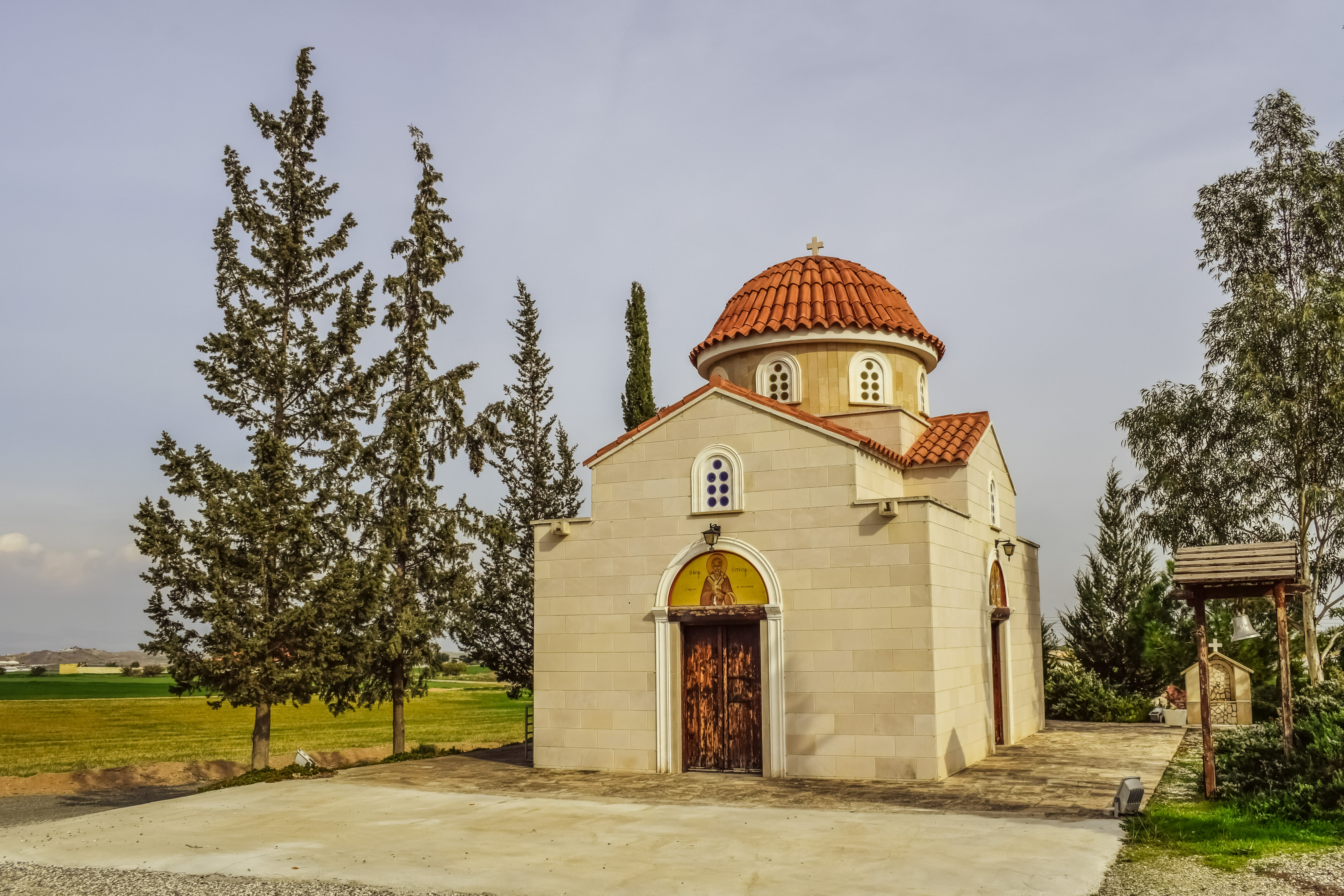 St. Eftichios chapel in Nisou